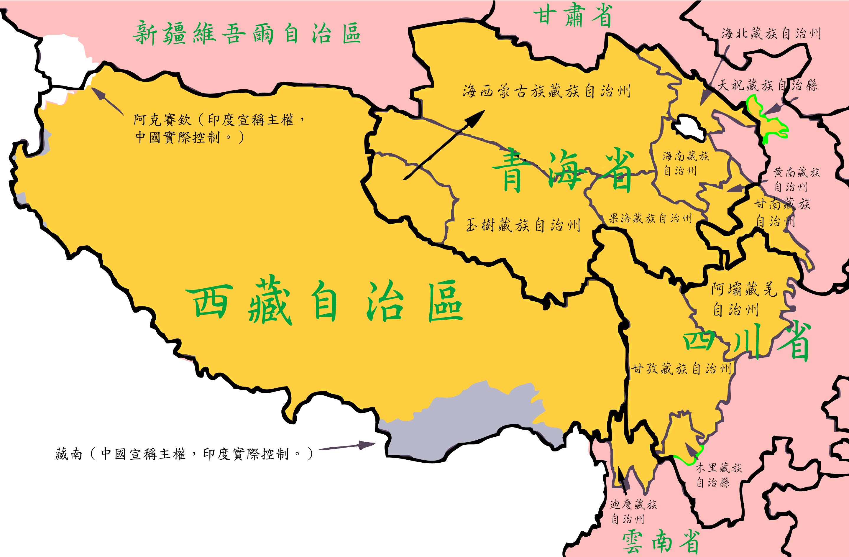 Tibet Autonomous Region + Tibetan Autonomous Prefectures + Tibetan Autonomous Counties Base map is File:China administrative.png, which is based on a large-scale map of China made by woodhome and hunry of the XZQH forums. Translator:ILVTW 繁體中文版